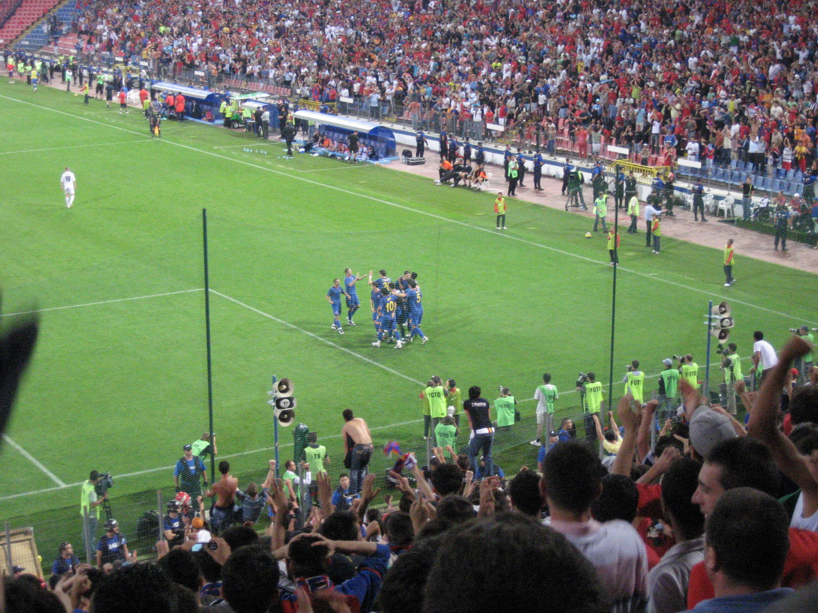 FC Steaua Bucuresti celebrating a goal as seen from the Peluza Nord. author: Vladi Paunescu taken: 8 August 2007, Steaua - Zaglebie Lubin 2-1